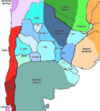 Mapa de las Provincias Unidas del Río de la Plata alrededor de 1823